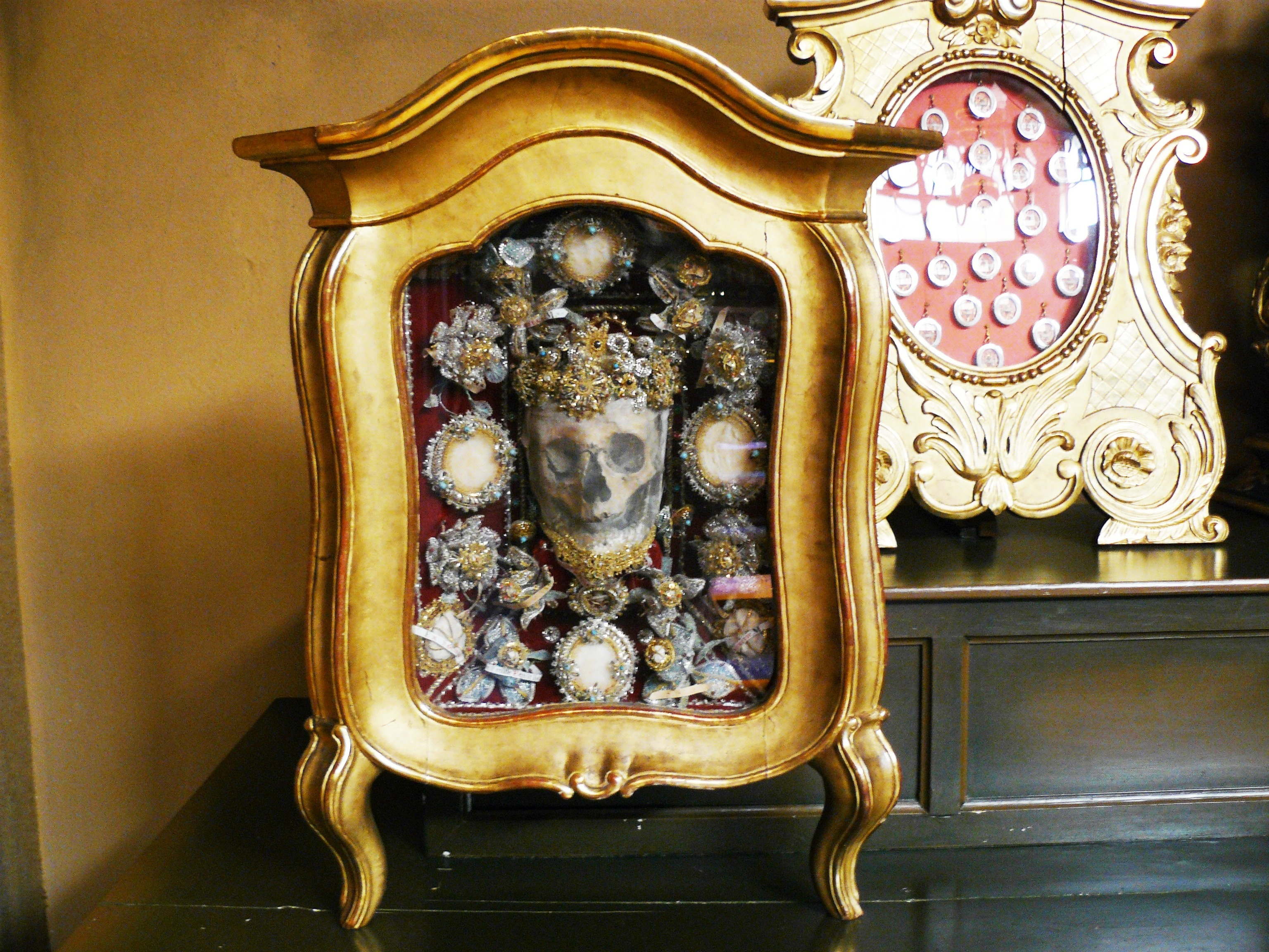 Châsse contenant des reliques exposée dans la petite chapelle du Bon Pasteur construite après la Seconde Guerre mondiale au Prieuré de Thierenbach (Haut-Rhin).